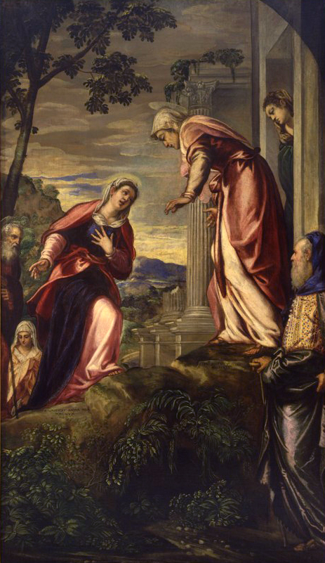 detail